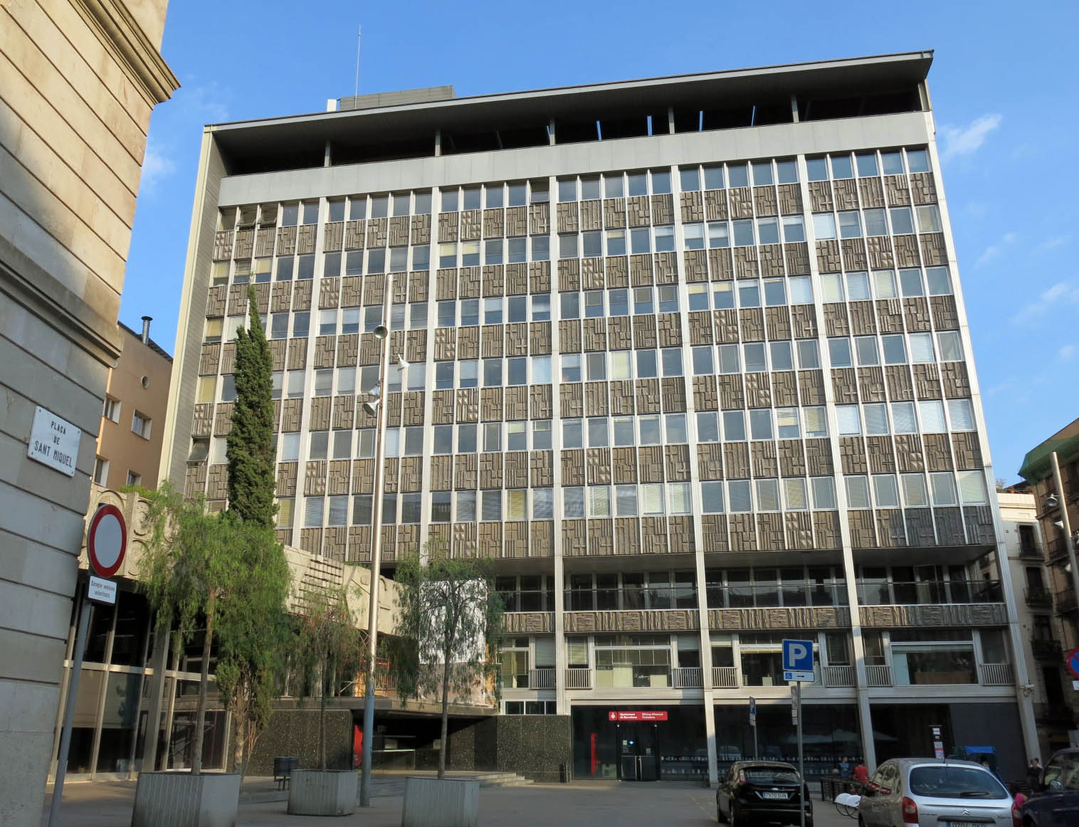 Casa de la Ciutat (Barcelona) Object location41° 22′ 57.23″ N, 2° 10′ 38.62″ E